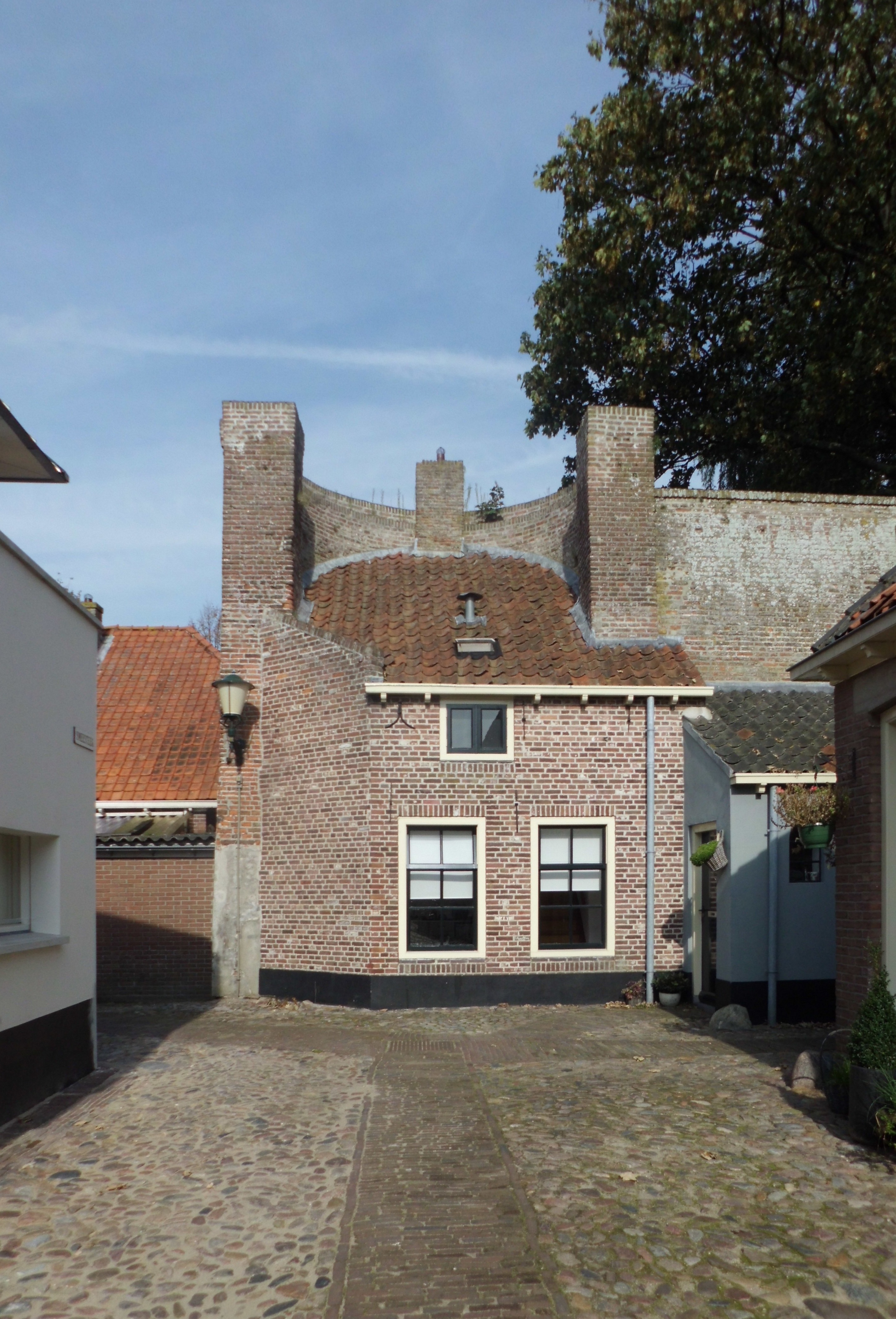 Oosterwalstraat 15 Elburg